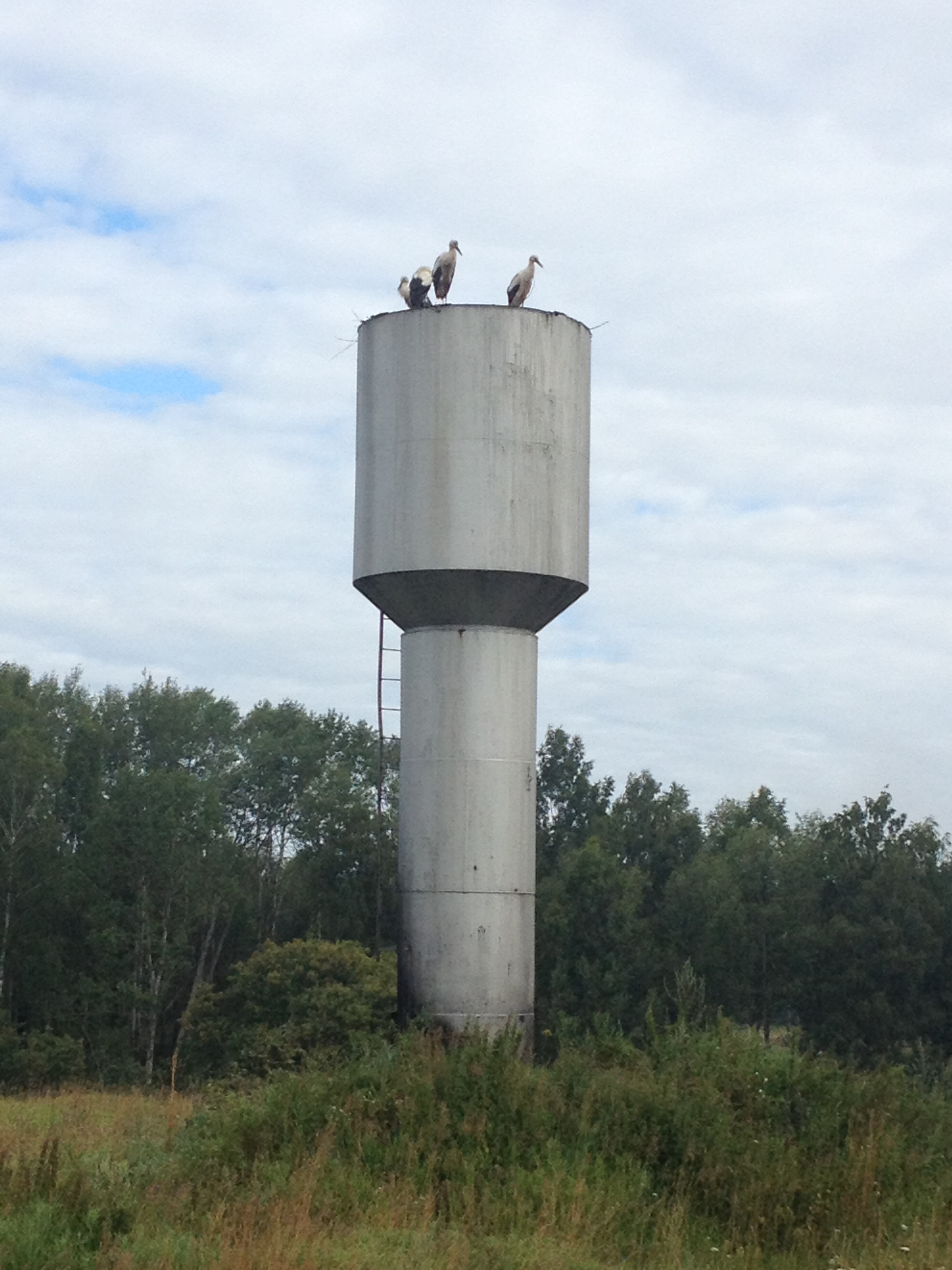 (июль 2013)